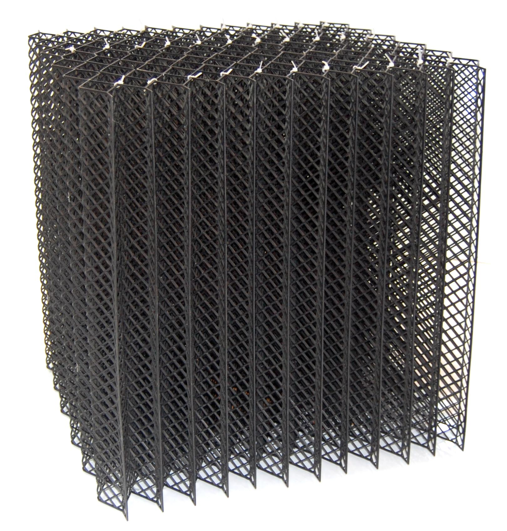 3.Ороситель капельно-плёночный БНС 5.5.5.